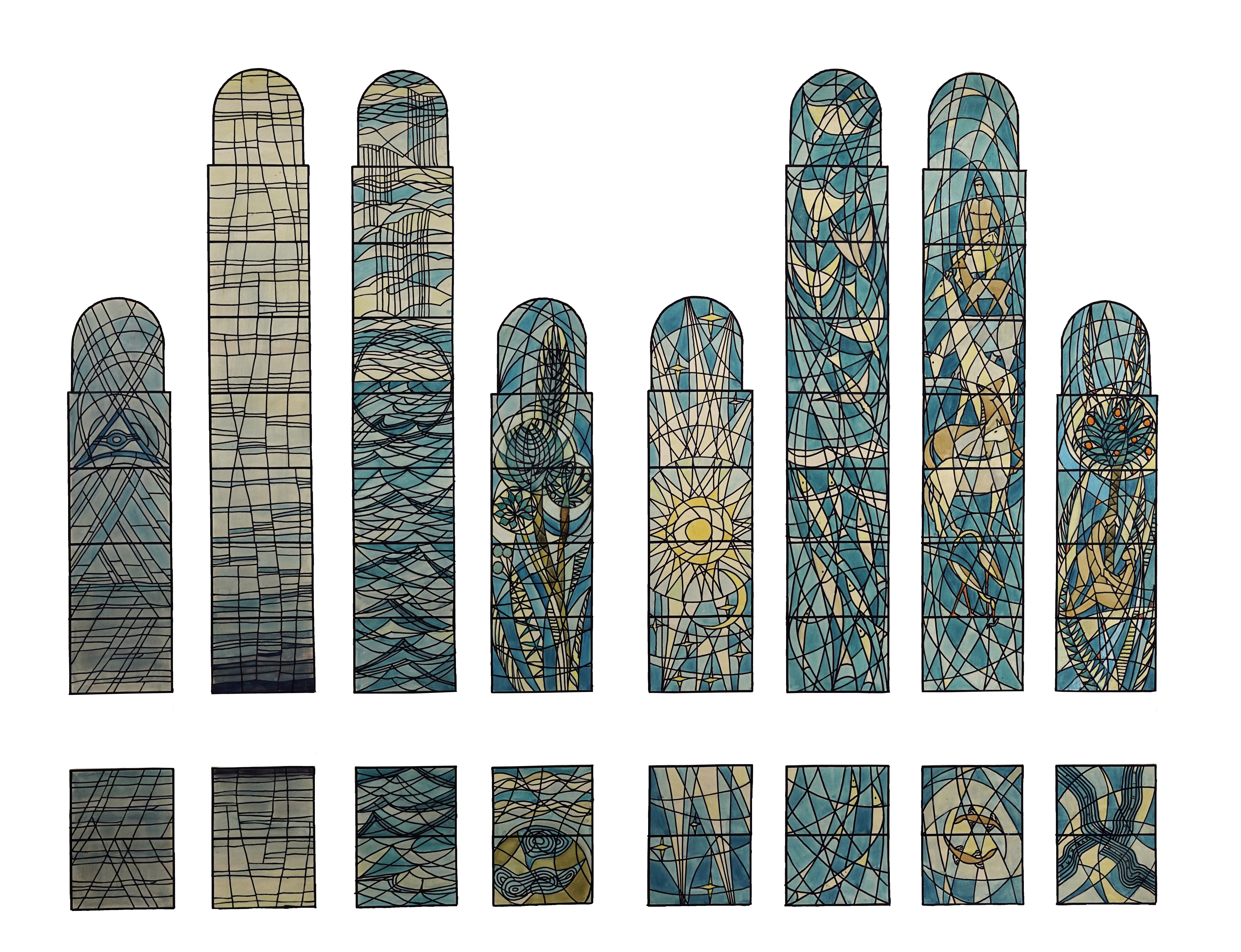 Günter Johl, Schöpfungszyklus (Entwurf), 1956. Die einzelnen farbigen Entwürfe befinden sich im Besitz der Tochter des Künstlers, Amadee Vorsteher-Johl. Die Abbildung zeigt eine rekonstruierende Zusammenstellung der ehemaligen Fenster der Nikodemuskirche in Berlin-Neukölln, die 1988 im Zuge einer Modernisierung des Kirchraums zerstört und durch klare Verbundglasfenster ersetzt wurden. Rekonstruktion: Christian Wenk und Claudia Brykczynski.